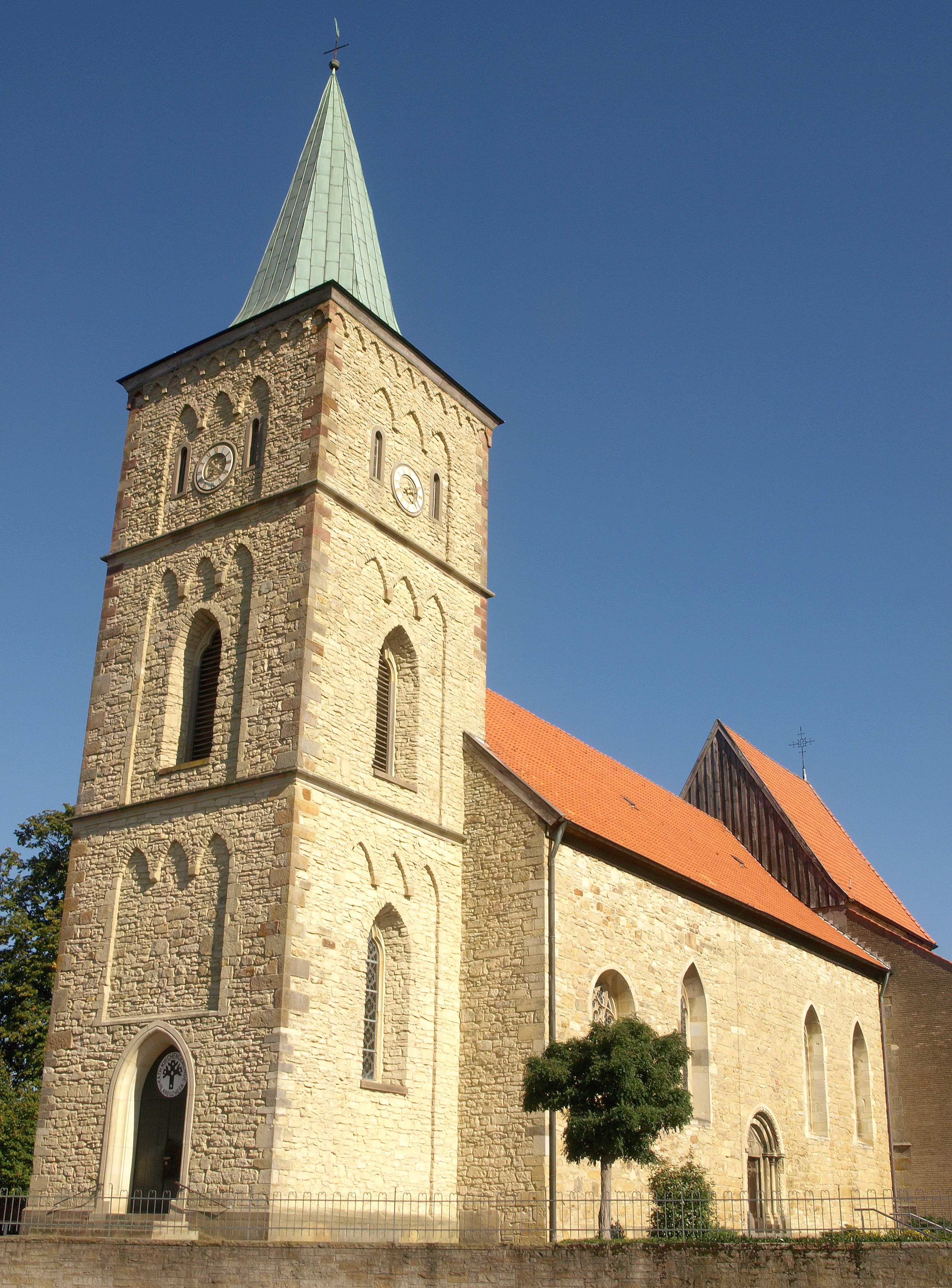 Die Katholische Pfarrkirche St. Ludgerus in Heek ist in der Denkmalliste der Gemeinde unter der Nummer 3 gelistet This is a photograph of an architectural monument.